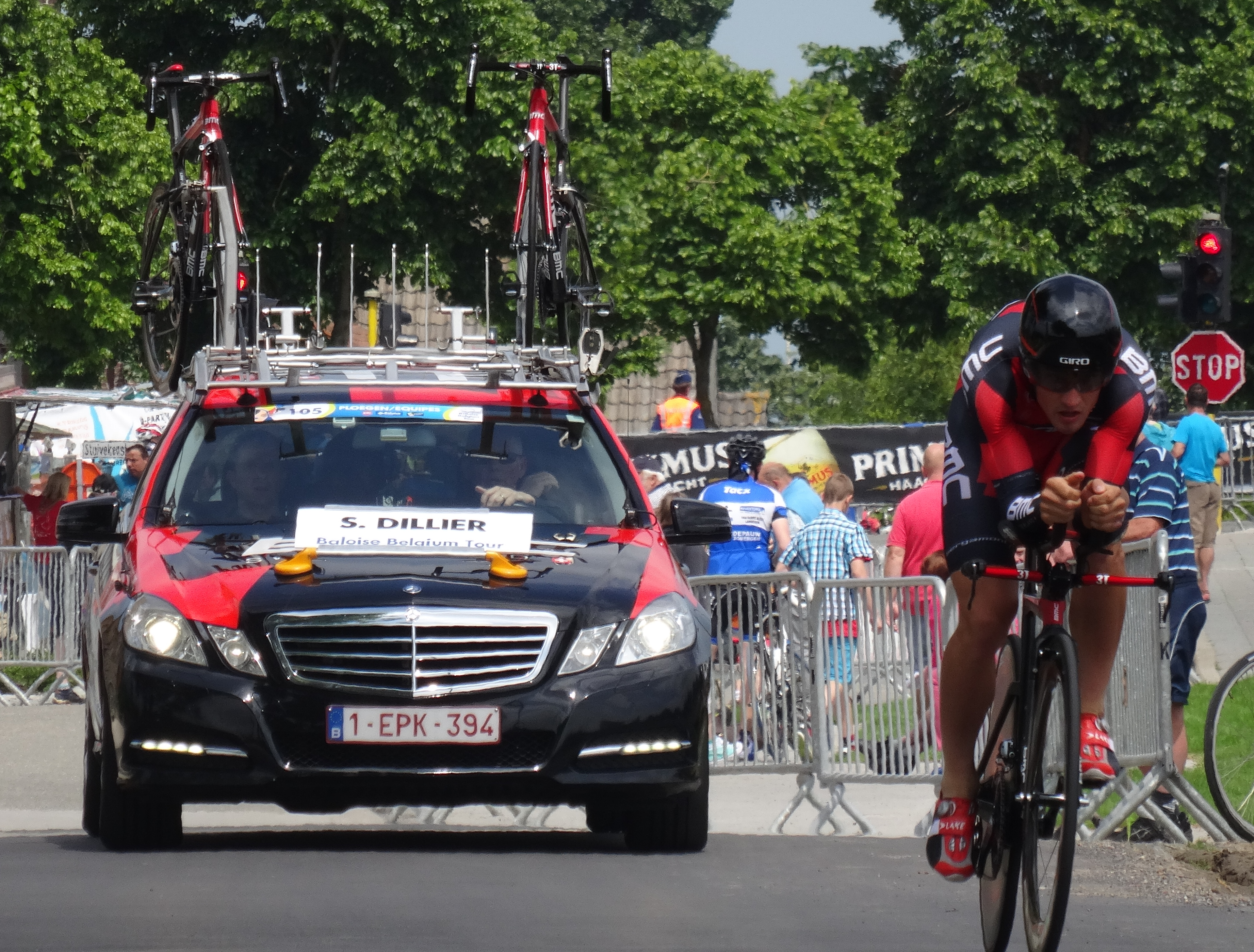 Reportage photographique réalisé le vendredi 30 mai à l'occasion du contre-la-montre individuel de la troisième étape du Tour de Belgique 2014 à Dixmude, Belgique.